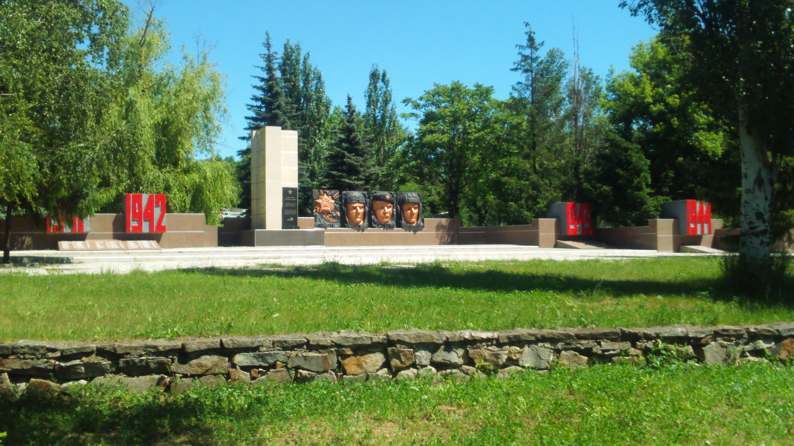 Добропі́лля — село в Україні, Добропільському районі Донецької області, над річкою Водяна.